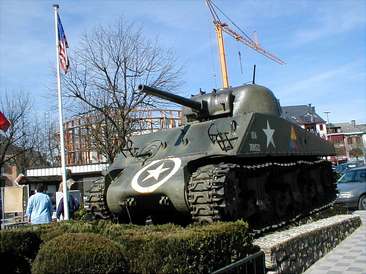 Le char Sherman M4 sur la place de Bastogne